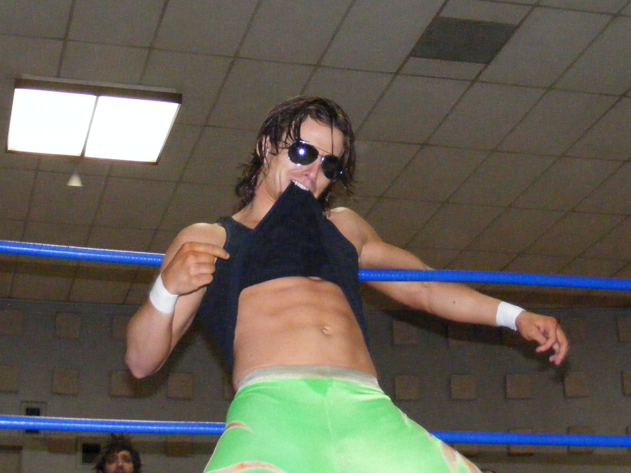 Adam Cole